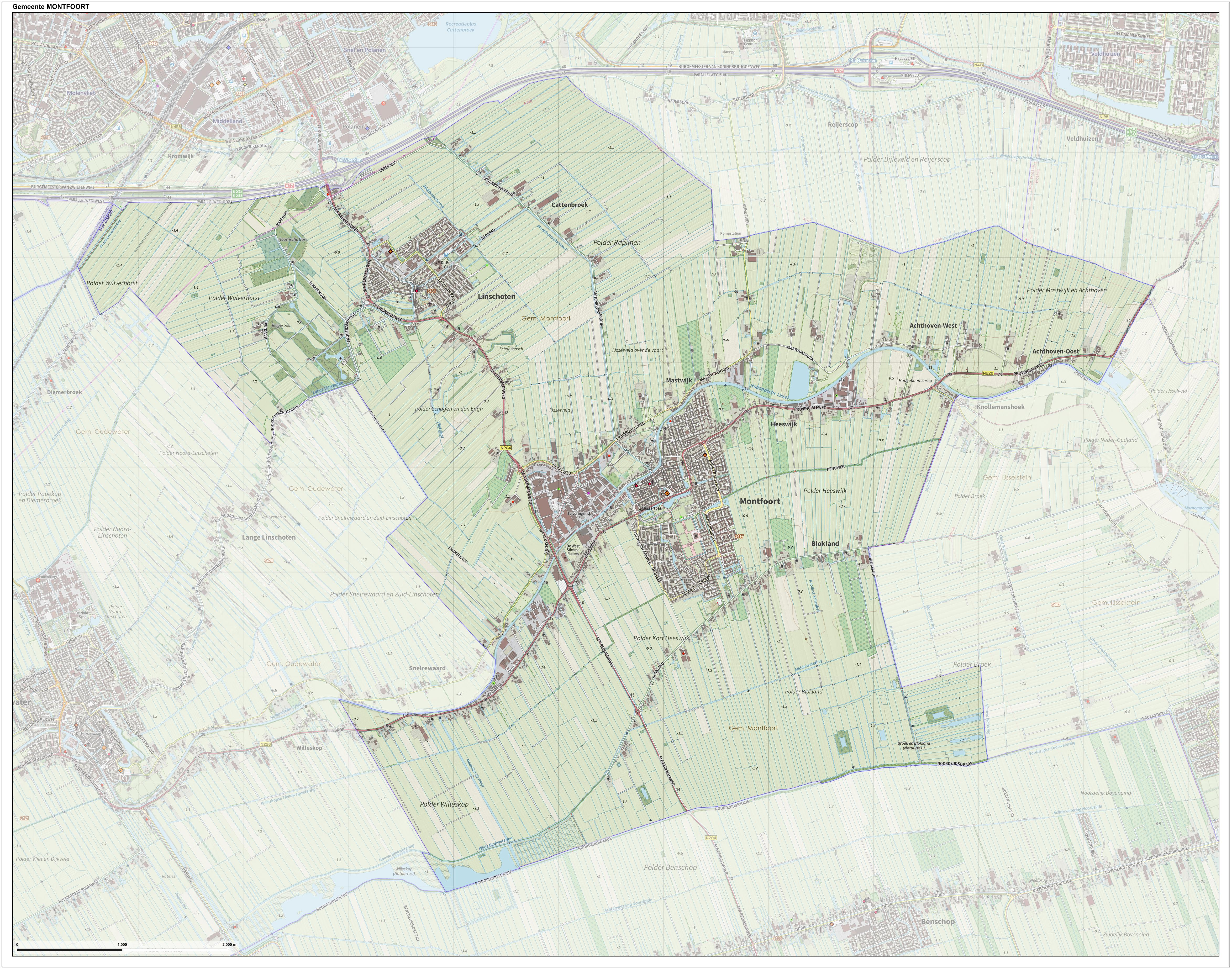 Topografische gemeentekaart. Resolutie: 400 pixels/km. Kaartbeeld samengesteld uit de open geodata van de Top10NL en Top25namen (Kadaster), Creative Commons-BY licentie. Gebouwvlakken uit open geodata BAG extract. Wegen uit de OpenStreetMap, OpenStreetMap community. Reliëfschaduw uit de Actuele Hoogtekaart AHN2. Samenstelling en kleurenschema: Jan-Willem van Aalst, met QGIS. Zie ook de Legenda.